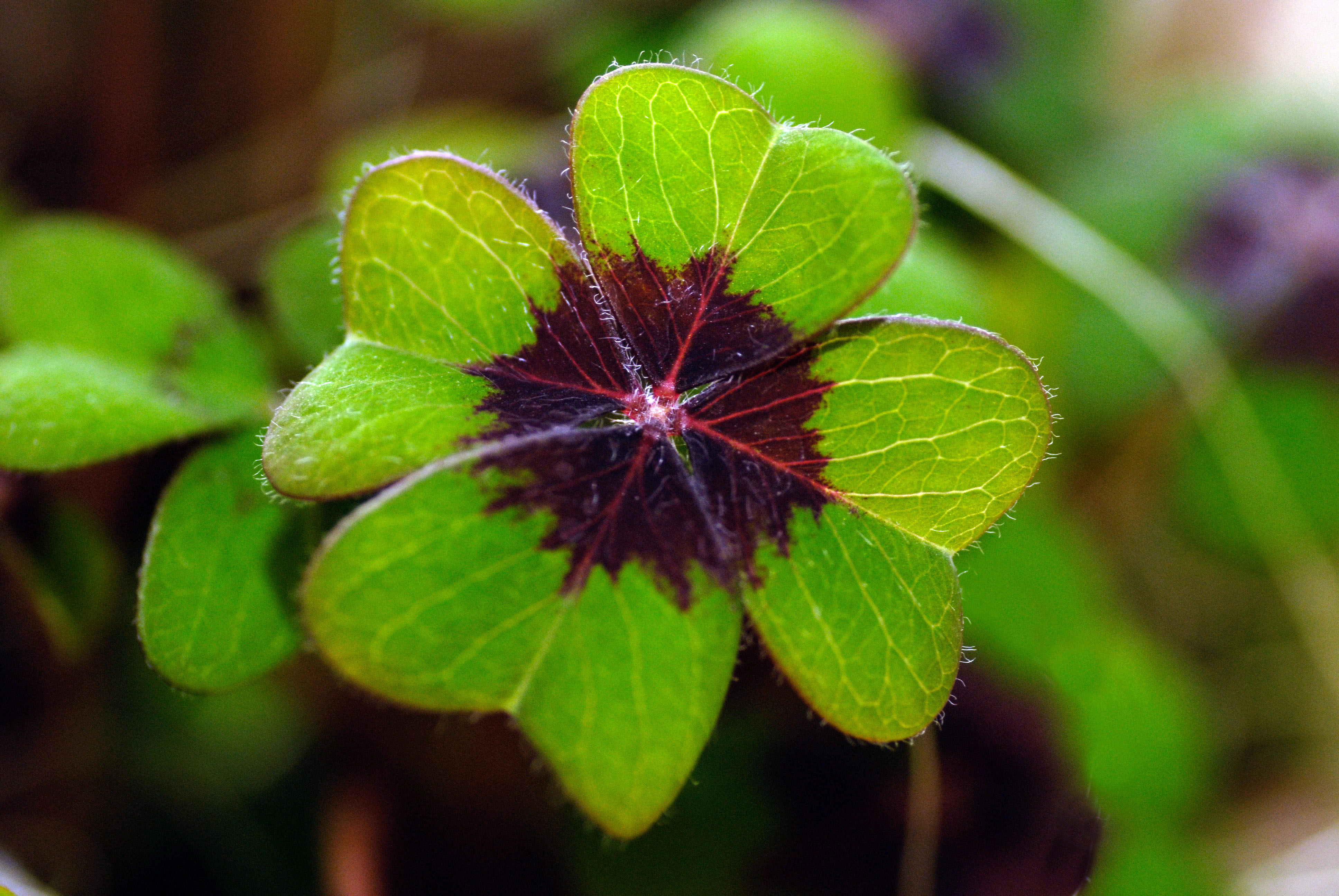 Oxalis tetraphylla, einzelnes Blatt